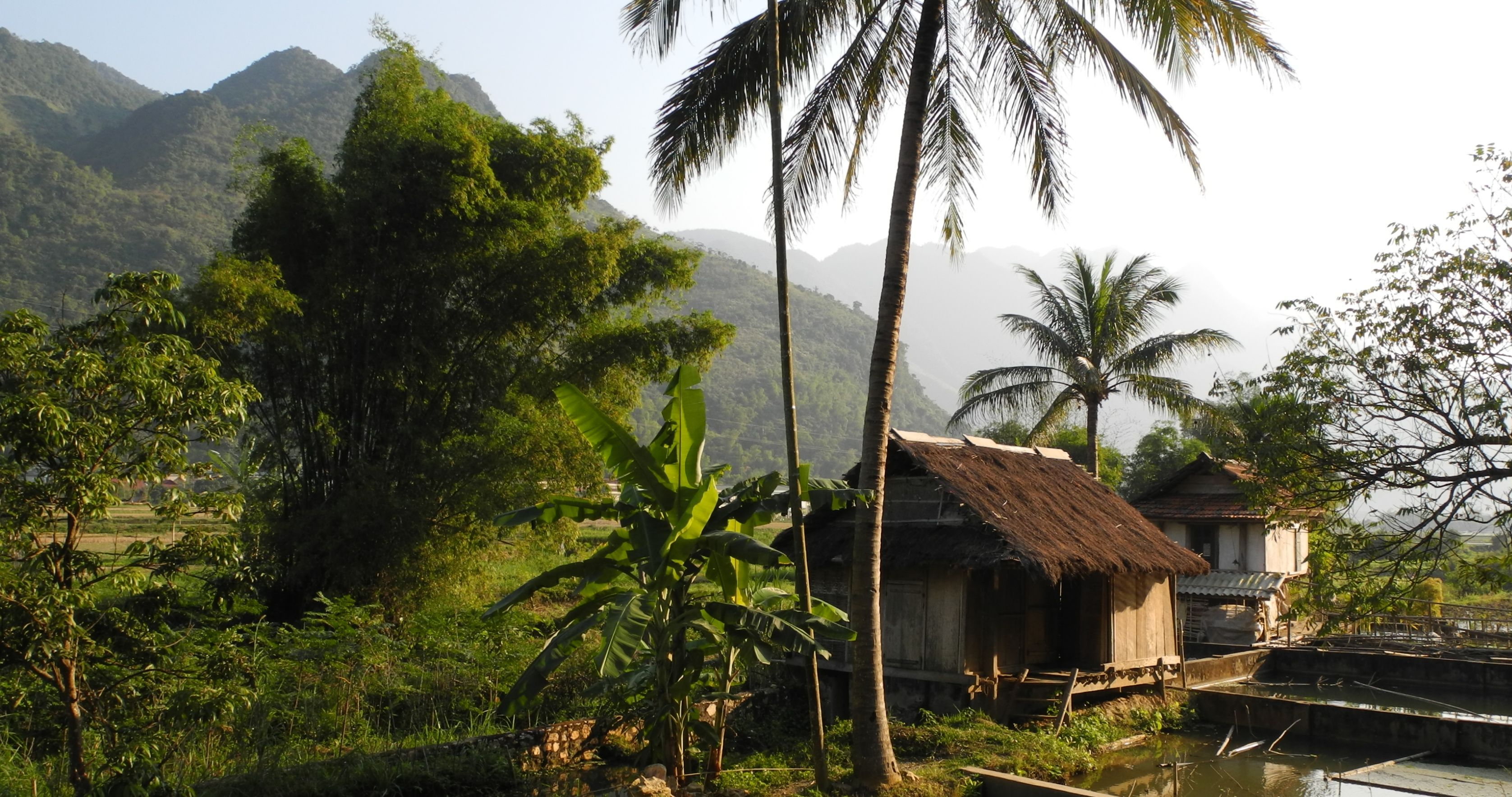 Mai Chau - Haus im Reisfeld,Palmen